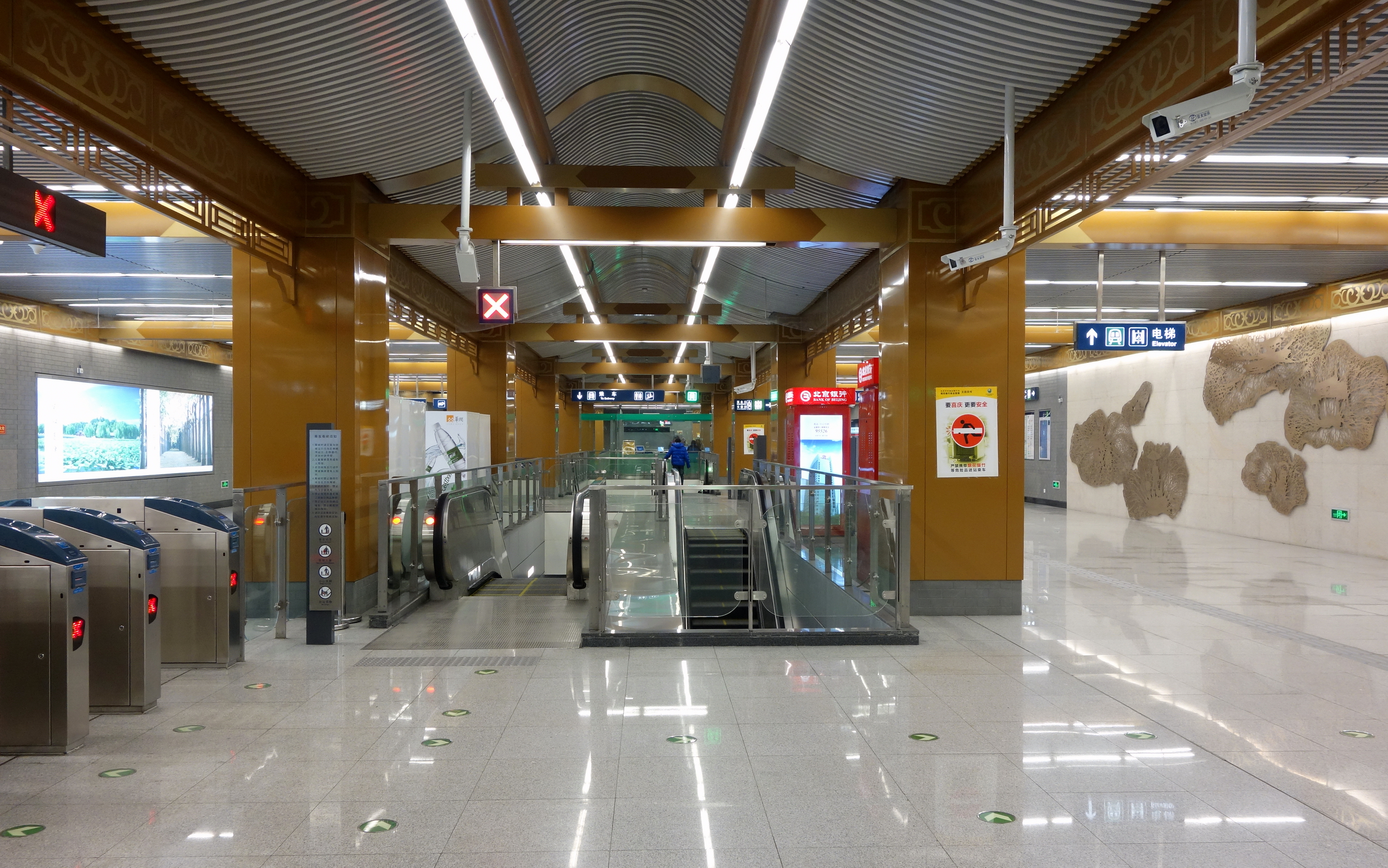 什刹海站站厅